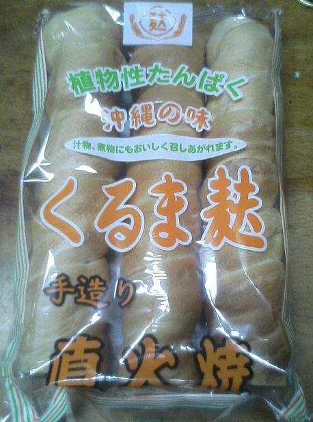 くるま麩。2007年5月7日投稿者が撮影。